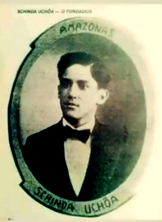 Fotografia de minha autoria do quadro de Schinda